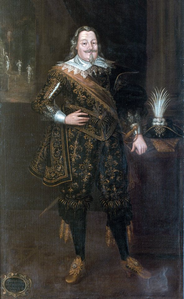 Graf Ludwig Günther I. (1581—1646), regierte von 1612 bis 1646